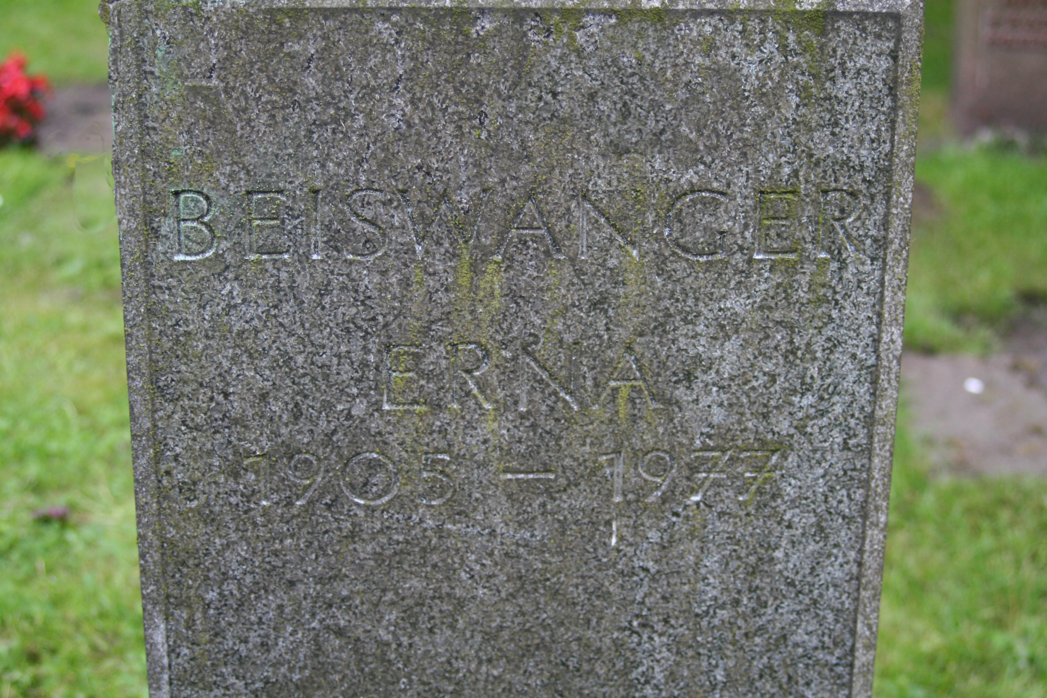 Grabstein von Erna & Rudolf Beiswanger.